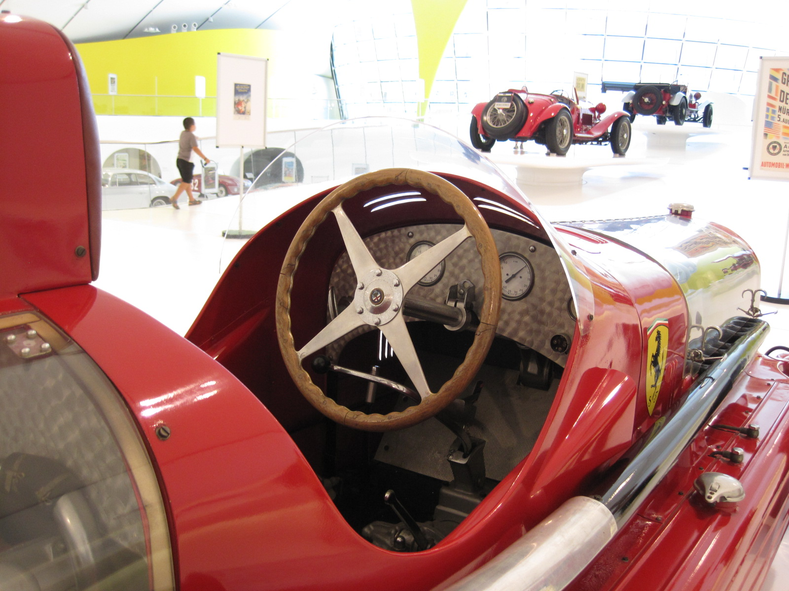 Automobiles in Enzo Ferrari Museum in Modène - Alfa Roméo Bimoteur 2 x 8 cylindres - 1935